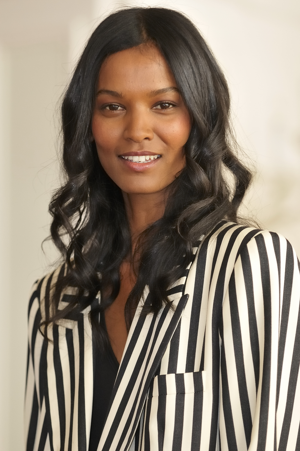 66ème Festival du Cinéma de Venise (Mostra), 4ème jour (05/09/2009). Photocall avec Liya Kebede pour le Film : Desert Flower.